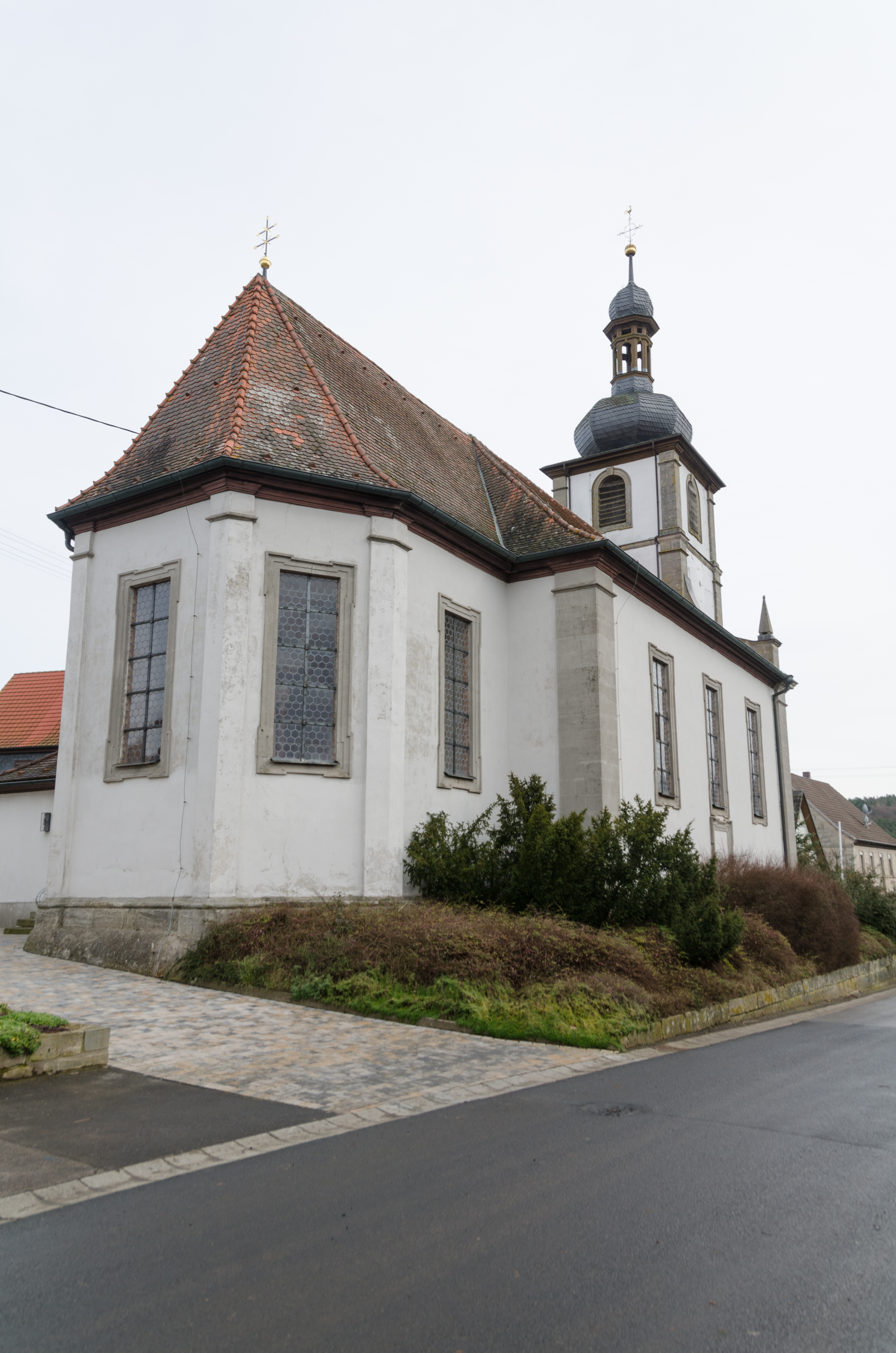 Bundorf, Neuses, Hl. Kreuz Kirche